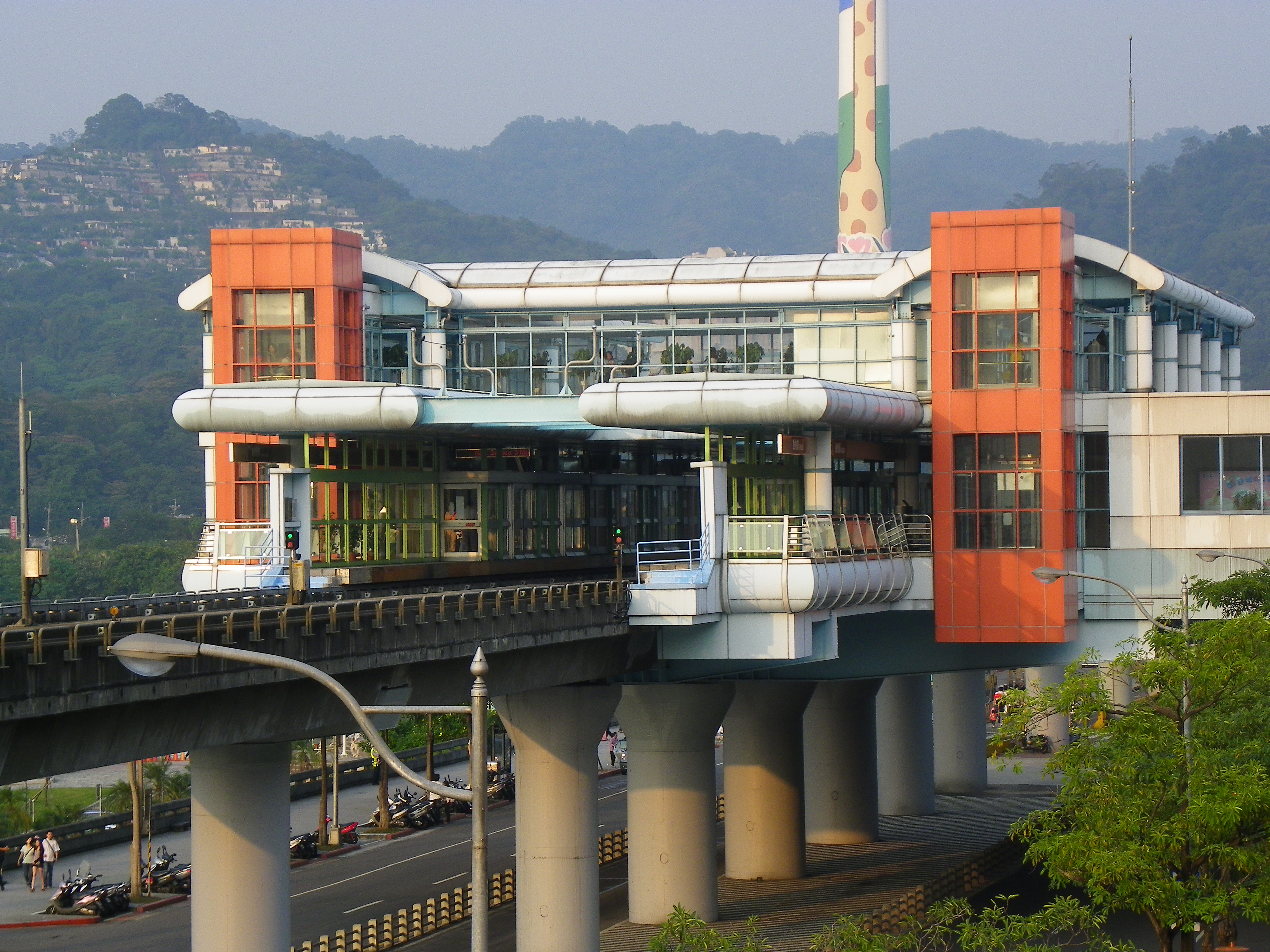 台北捷運文山線動物園駅。